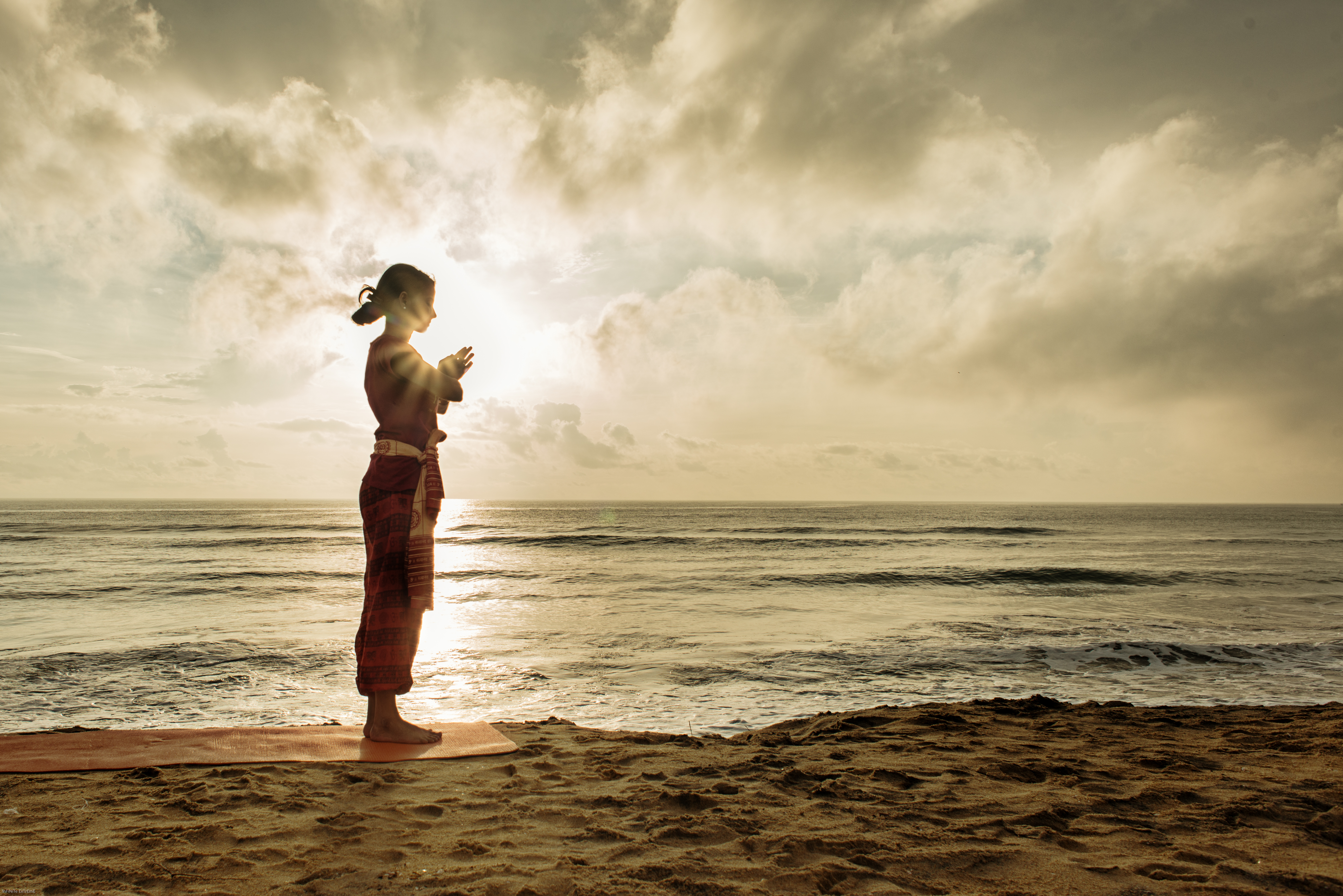 Yoga Namaste Surya Namaskar